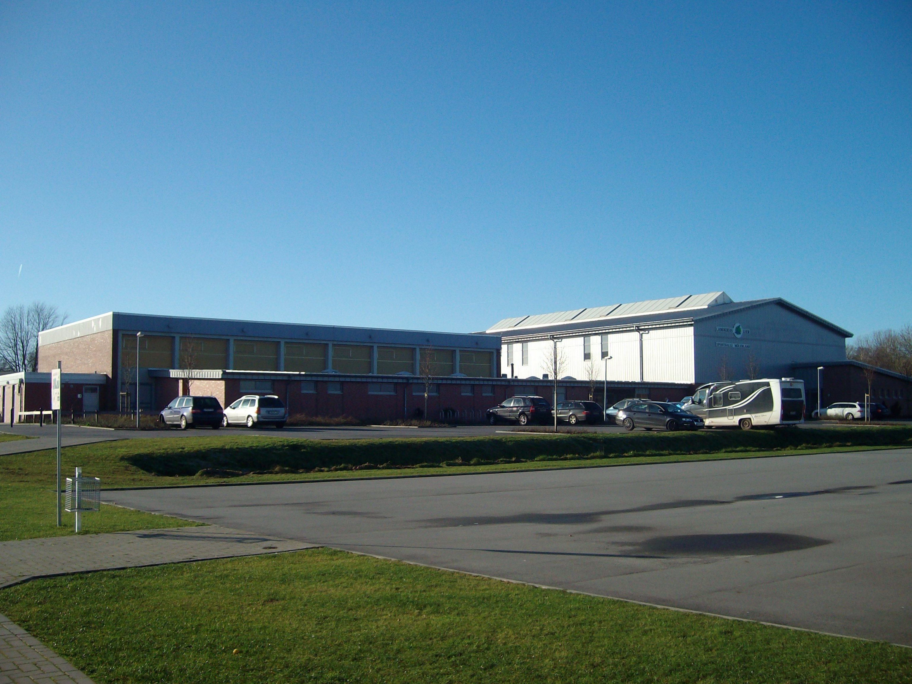 Sportanlage Mölenland, Bunde, Ostfriesland